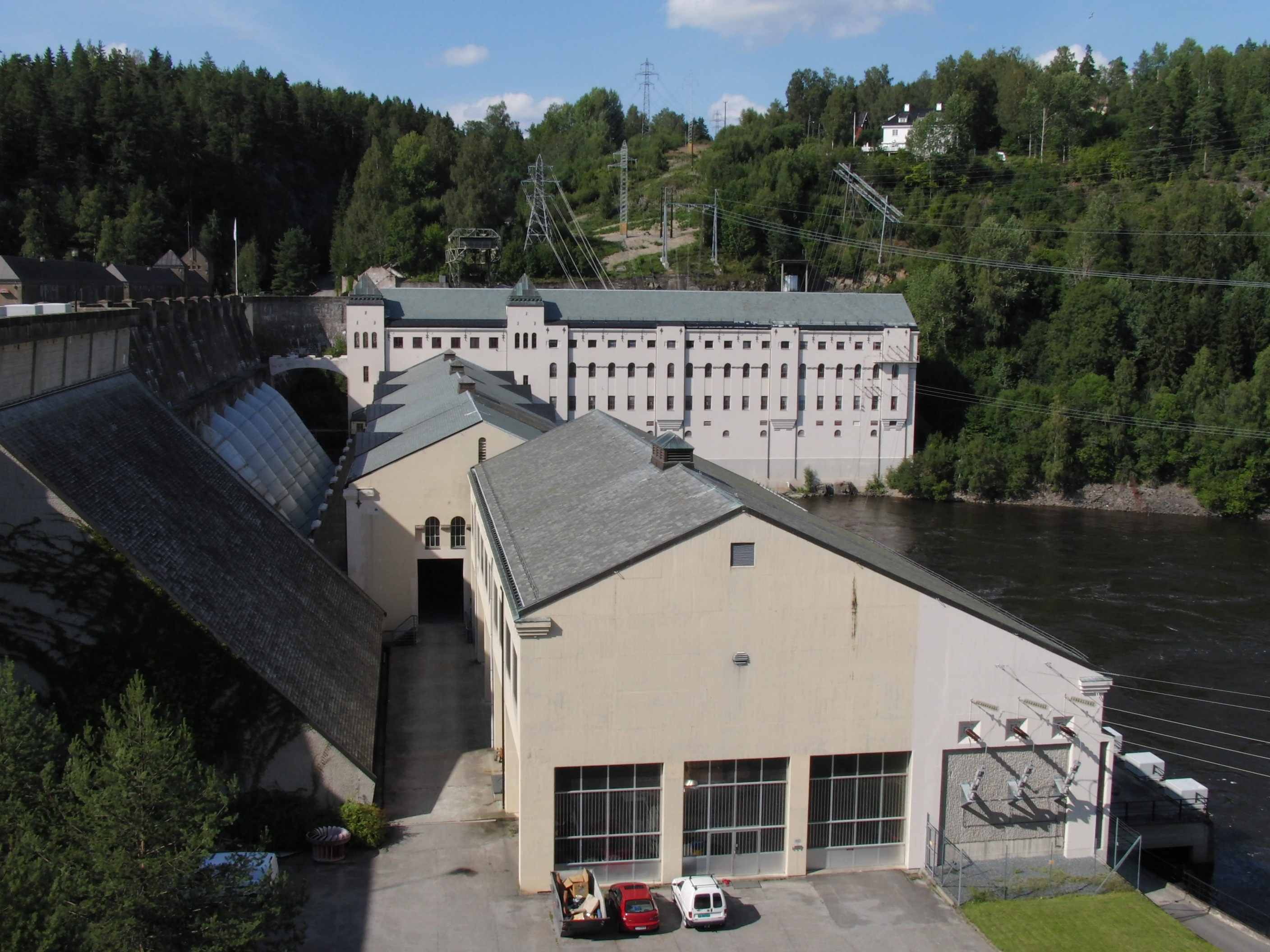 Vamma aggregat 11